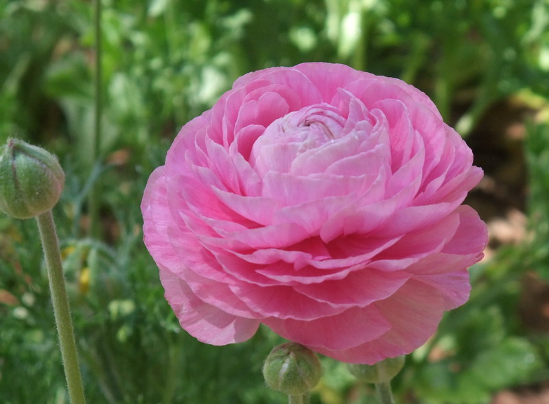 נורית ורודה